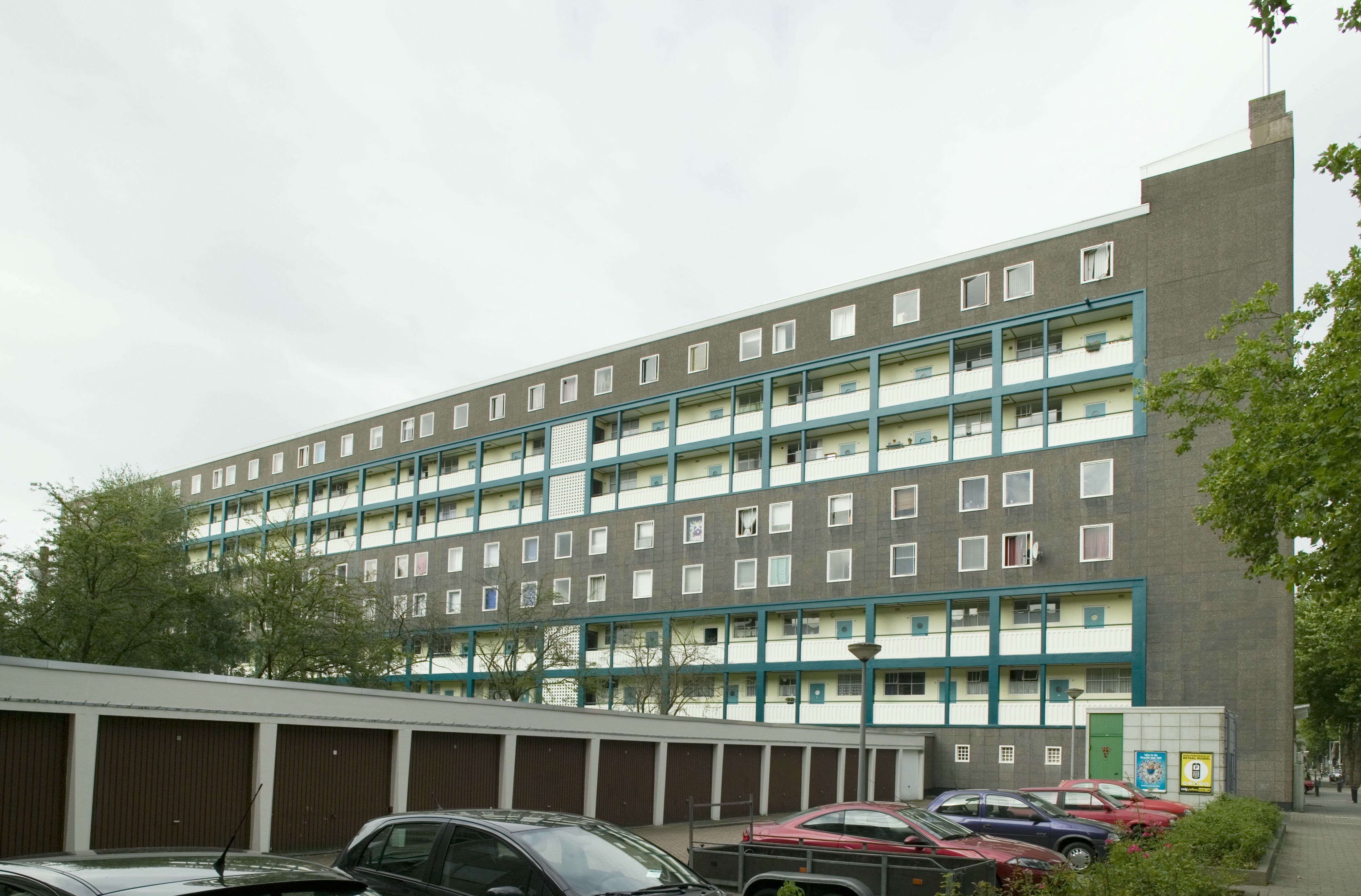 Sloterhof, woonwijk: Overzicht gedeelte woonwijk (opmerking: Gefotografeerd voor Monumenten van Herrezen Nederland)